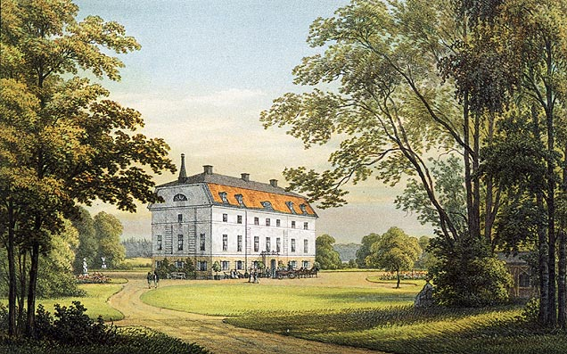 Granhammar. Litografi av A Nay.